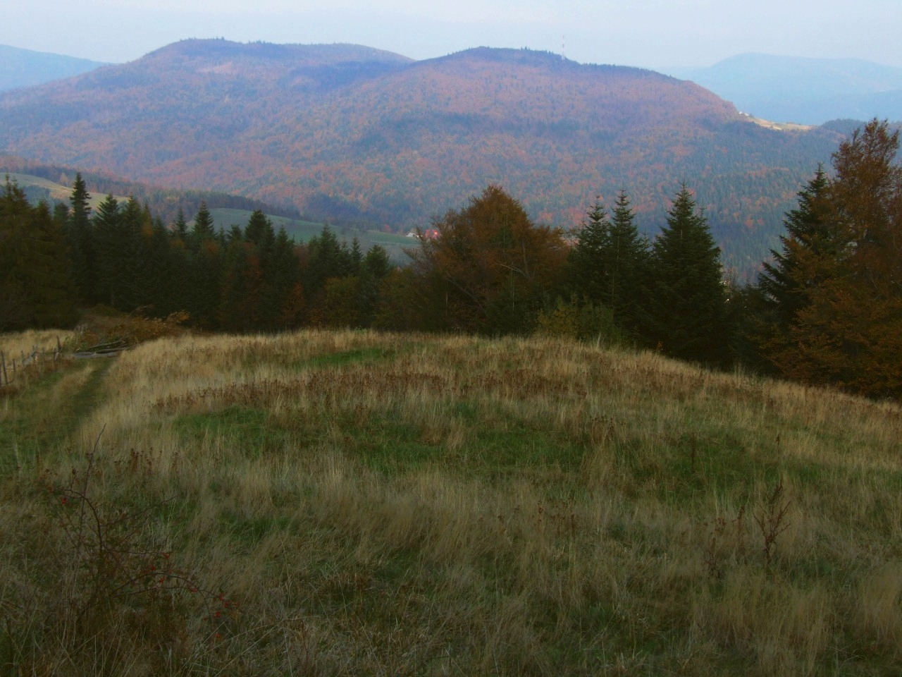 Wielki Wierch, Kiczora Kamienicka. Widok z Jaworzynki w Gorcach